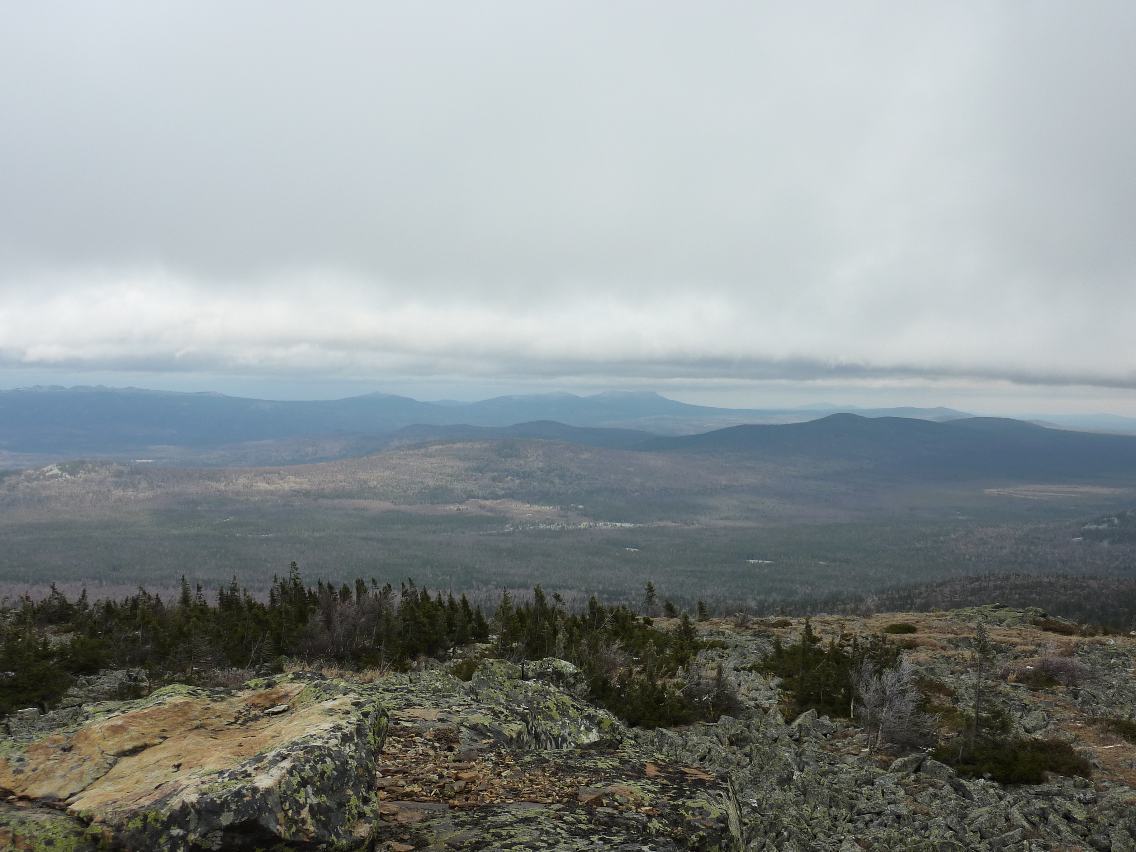 Valley R. Tuluk (South Urals), Bashkortostan, Russia. (Долина речки Тюлюк)